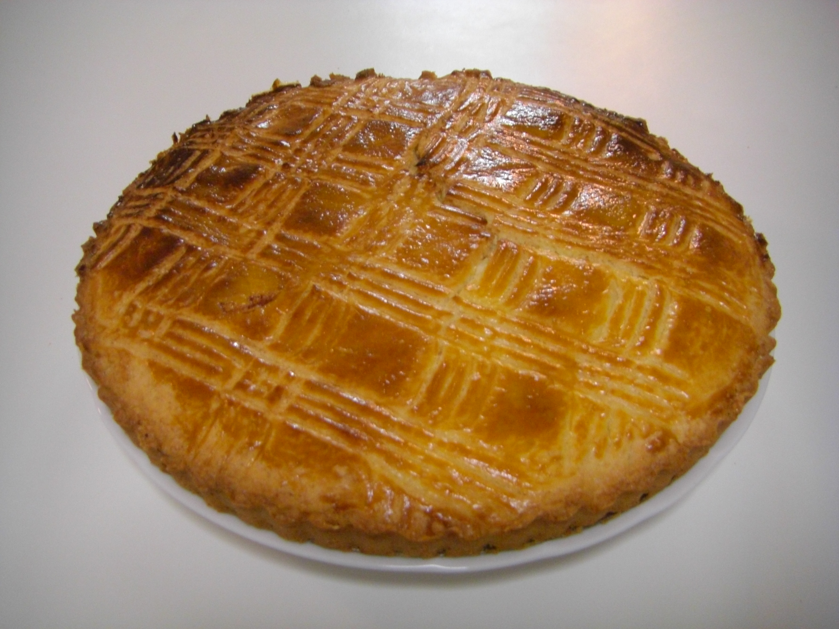 Broyé du Poitou (ou broyé poitevin) fait maison, une spécialité de la région du Poitou en France.